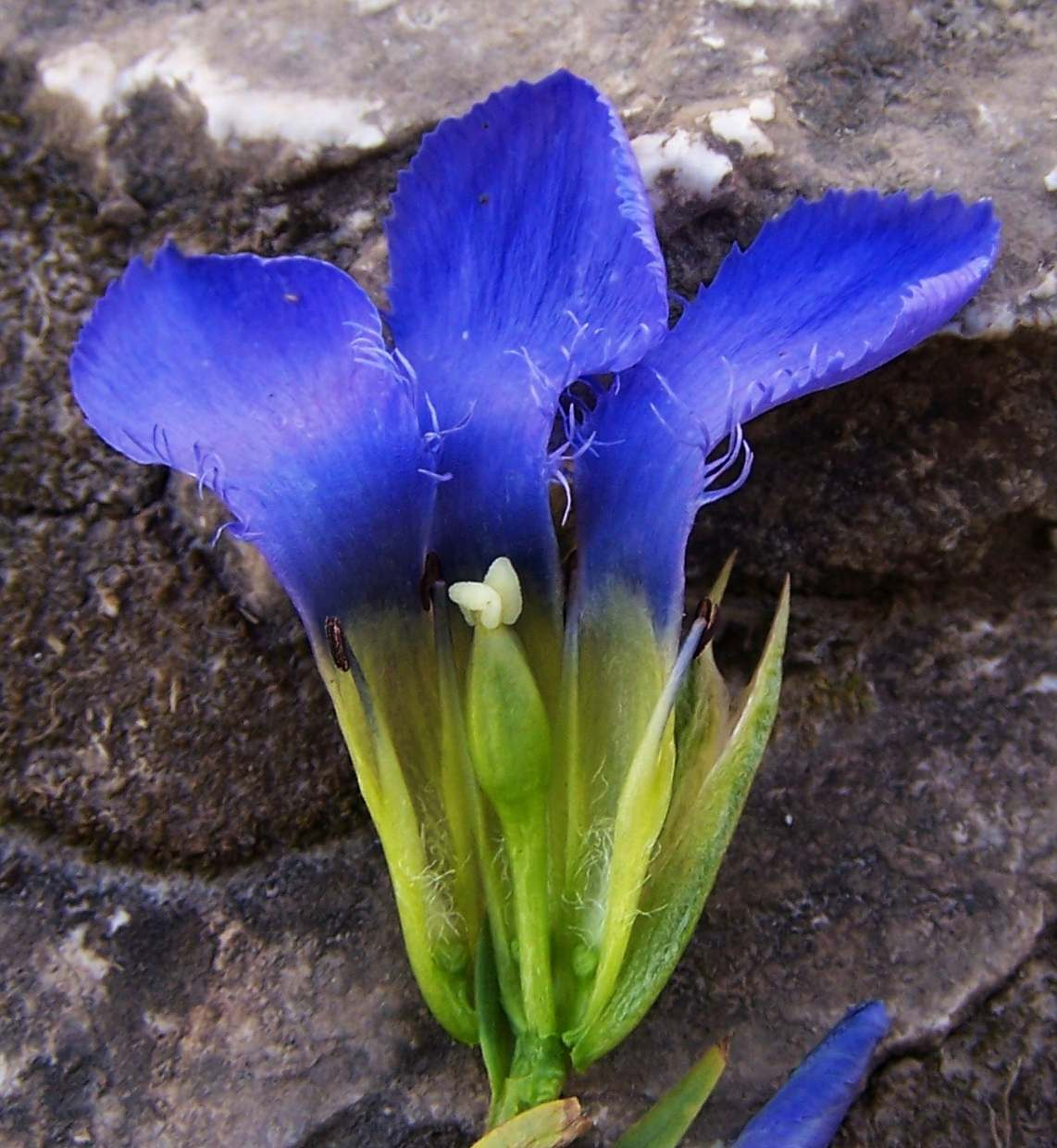 Gentianella ciliata (pl. goryczuszka orzęsiona), habitat: Tatra Mountains, Dolina Chochołowska